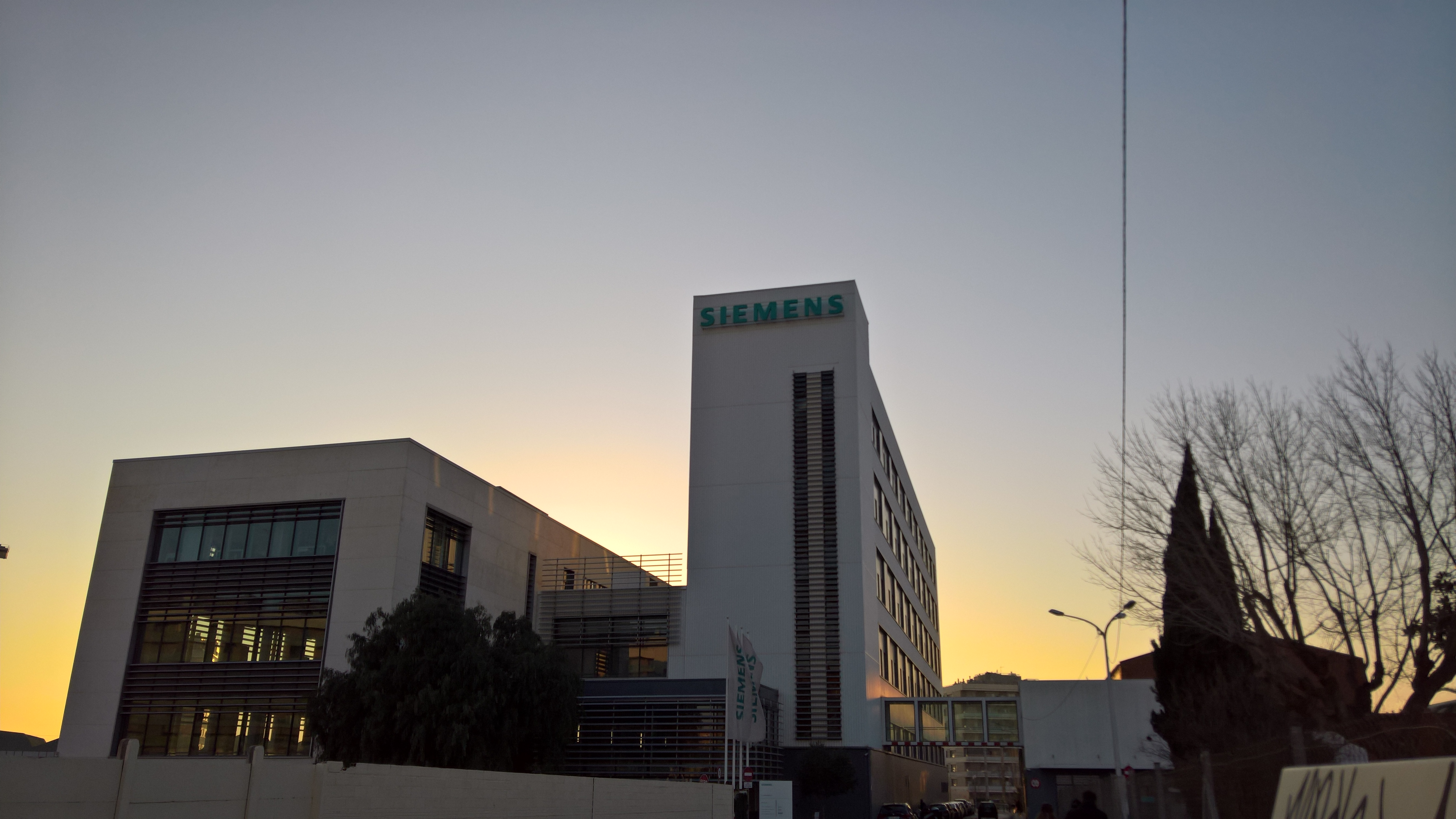 Fotografia actual de la fàbrica Siemens de Cornellà de Llobregat